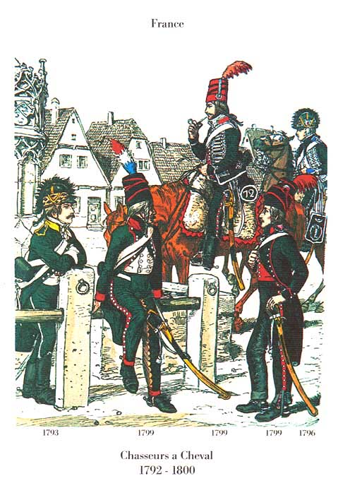 Конные егеря.